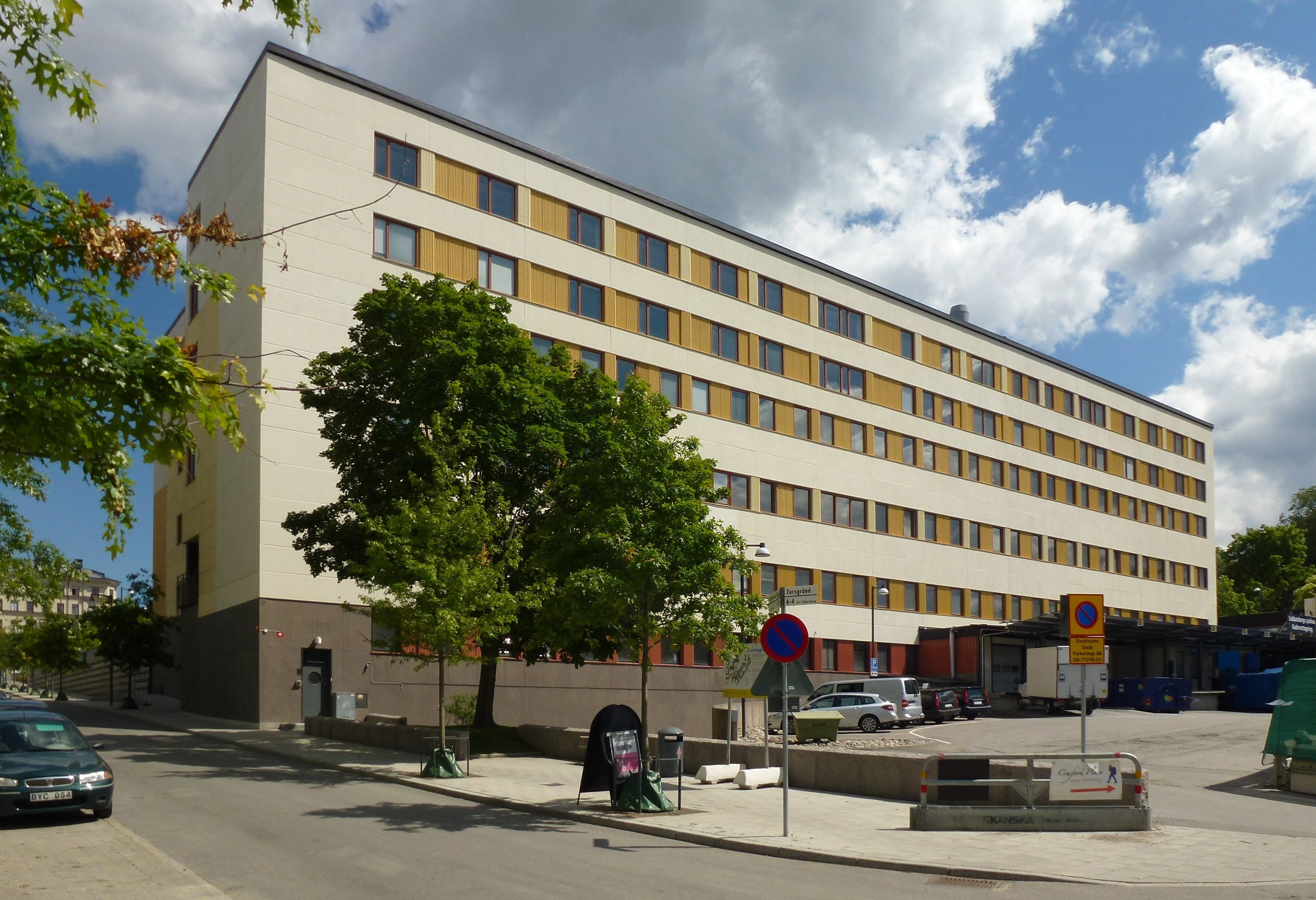 Sabbatsbergs sjukhus, fasad mot väst och Torsgränd.